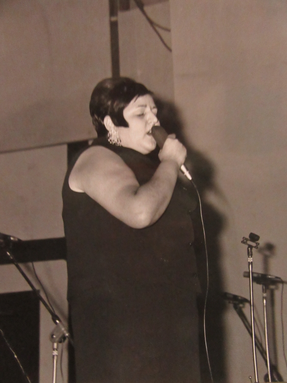 La cantante Luciana Turina si esibisce al Teatro Nuovo di Salsomaggiore Terme